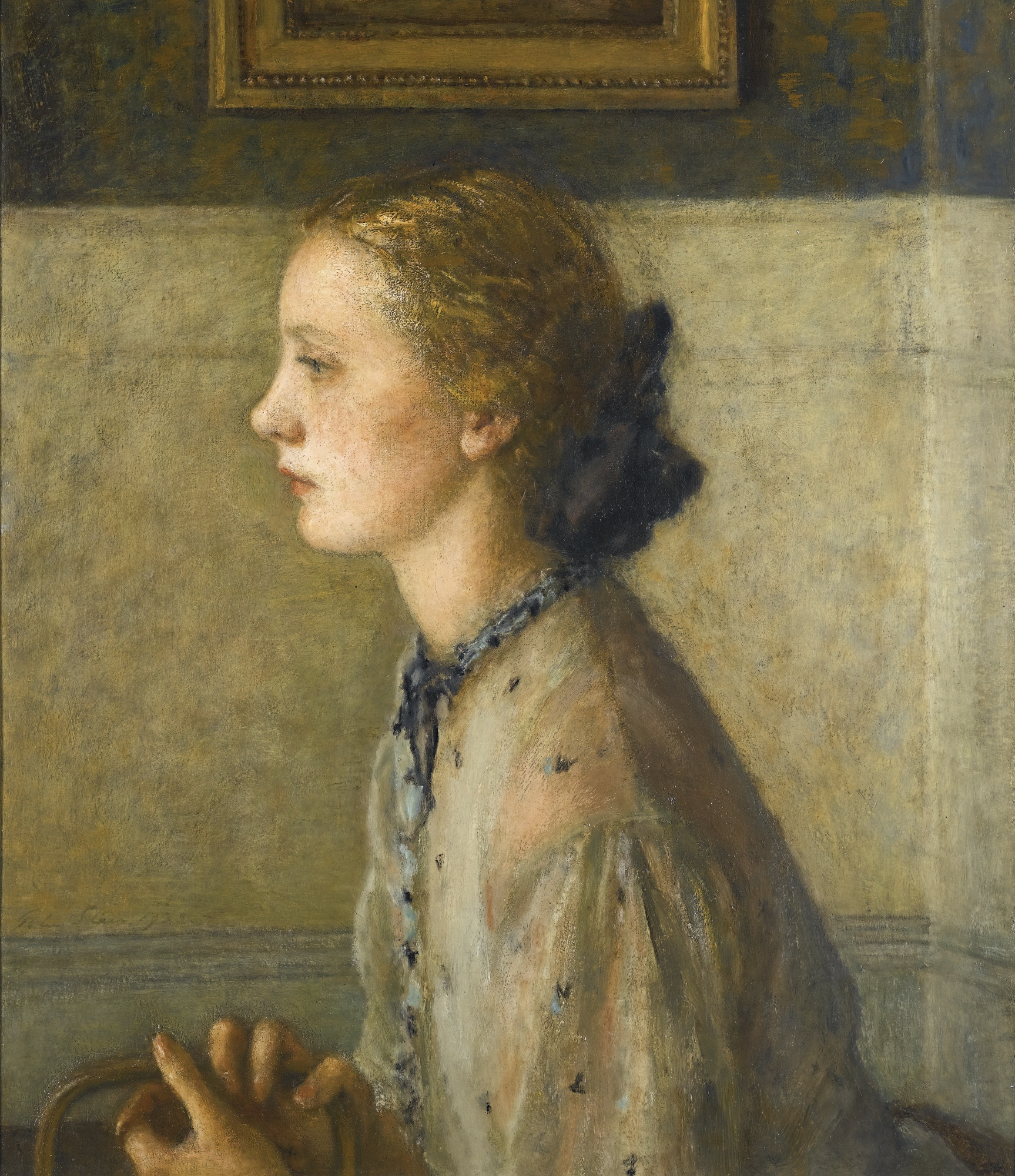 Portrait of Miss Rose Pettigrew. Philip Wilson Steer. Óleo sobre lienzo. Fecha (en estudio).